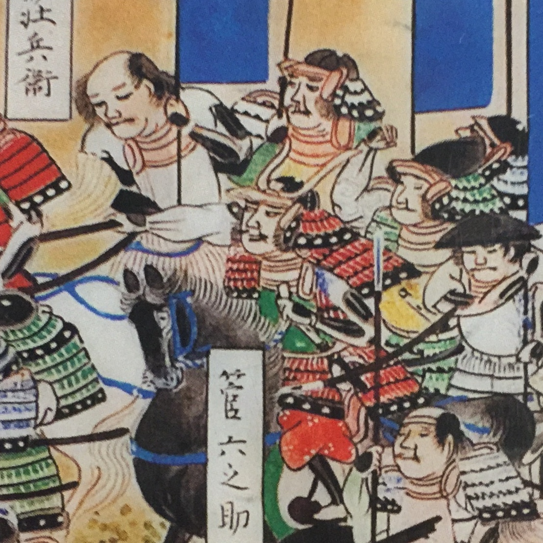 関ヶ原合戦図屏風（関ケ原町歴史民俗資料館本）に描かれた、黒田家家臣の菅六之助（正利）。